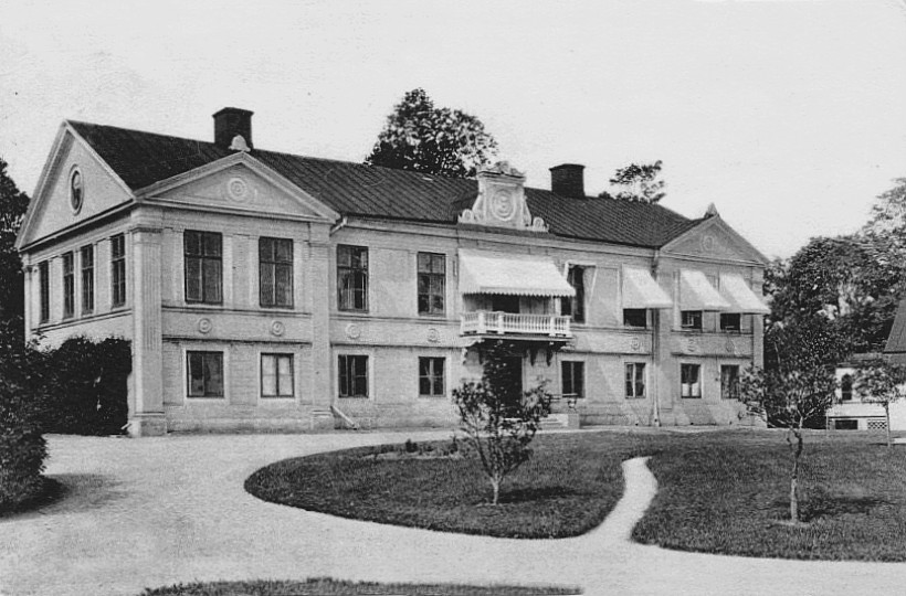 Forsby gårds huvudbyggnad